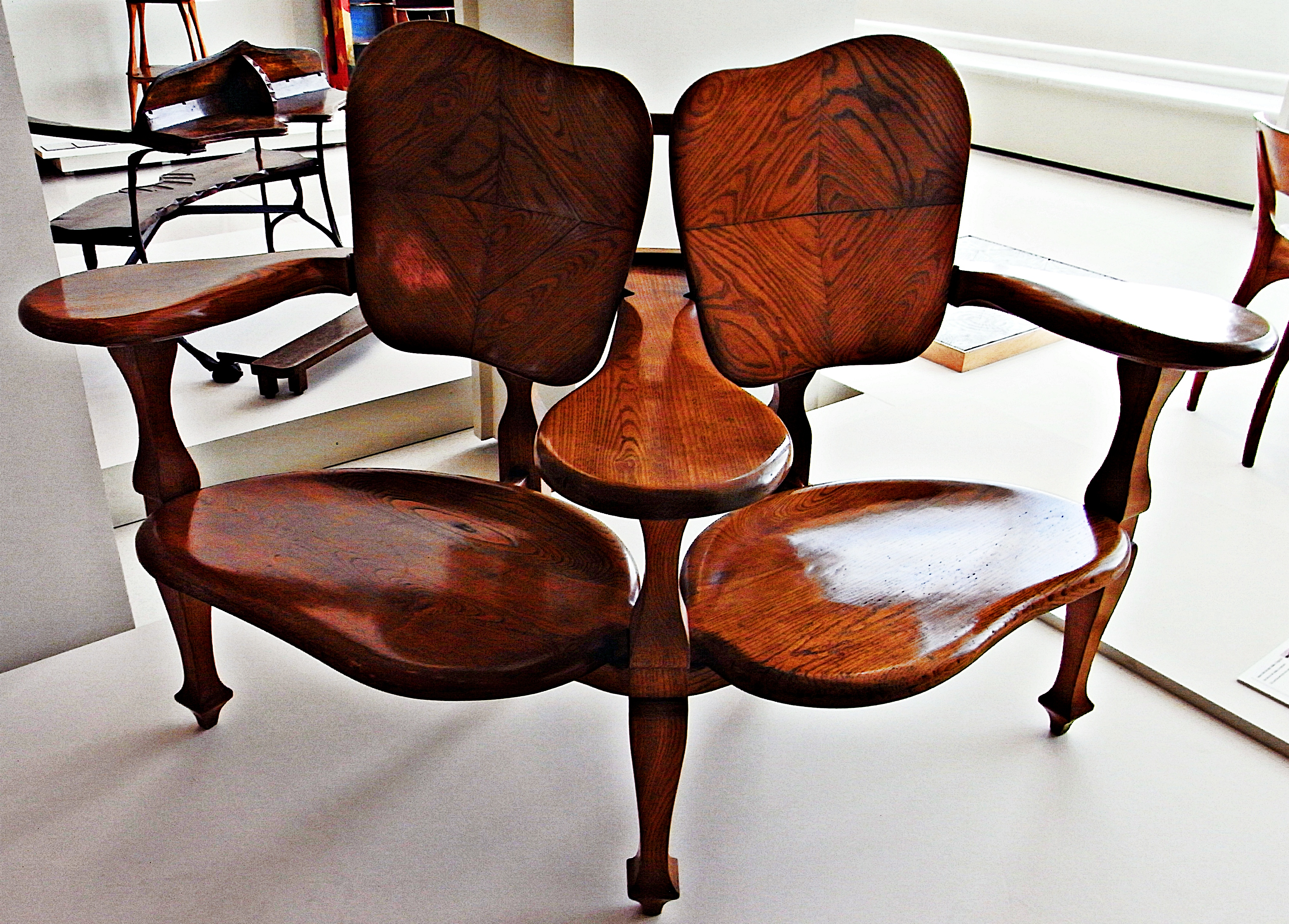 BARCELONA - Museu Nacional d´Art de Catalunya (Muntanya de Montjuïc) ANTONI GAUDÍ (Reus, 1852-Barcelona,1926) Confident Cap a 1904-1906 Fusta de freixe Execució del Taller Casas i Bardés